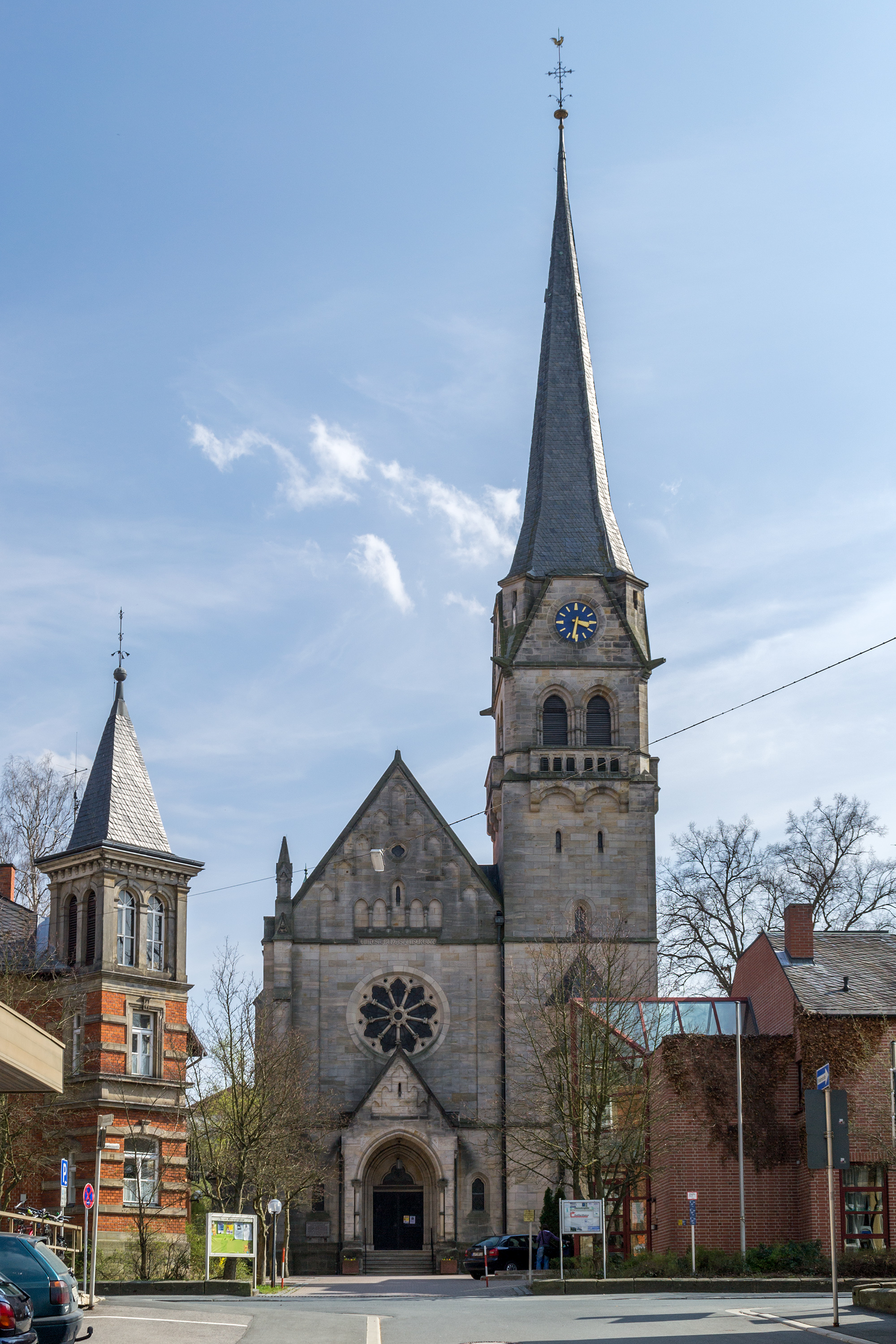 Gebäude Kronacher Straße 14 in Lichtenfels (Oberfranken), Martin-Luther-Kirche This is a photograph of an architectural monument.